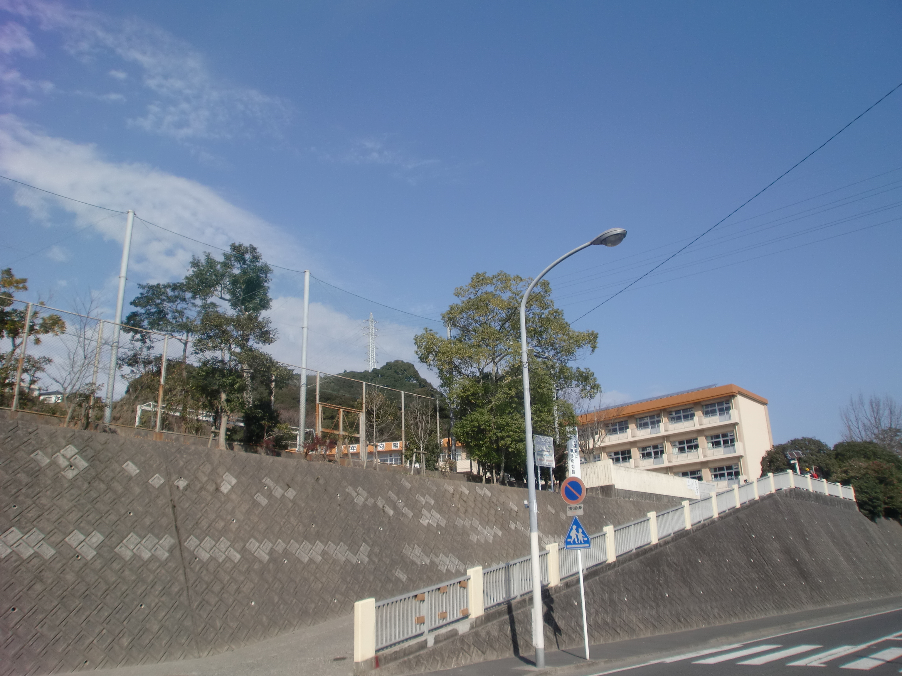 鹿児島市立向陽小学校の外観。